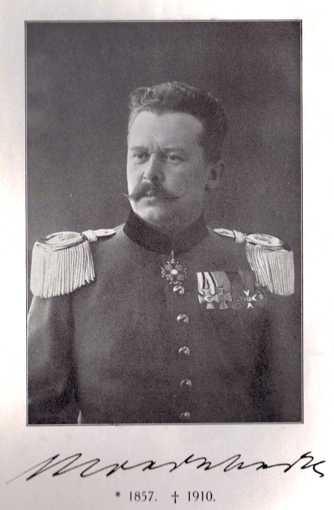 Hermann Moedebeck (1857-1910), Oberstleutnant, Autor und Förderer der frühen Luftfahrt.